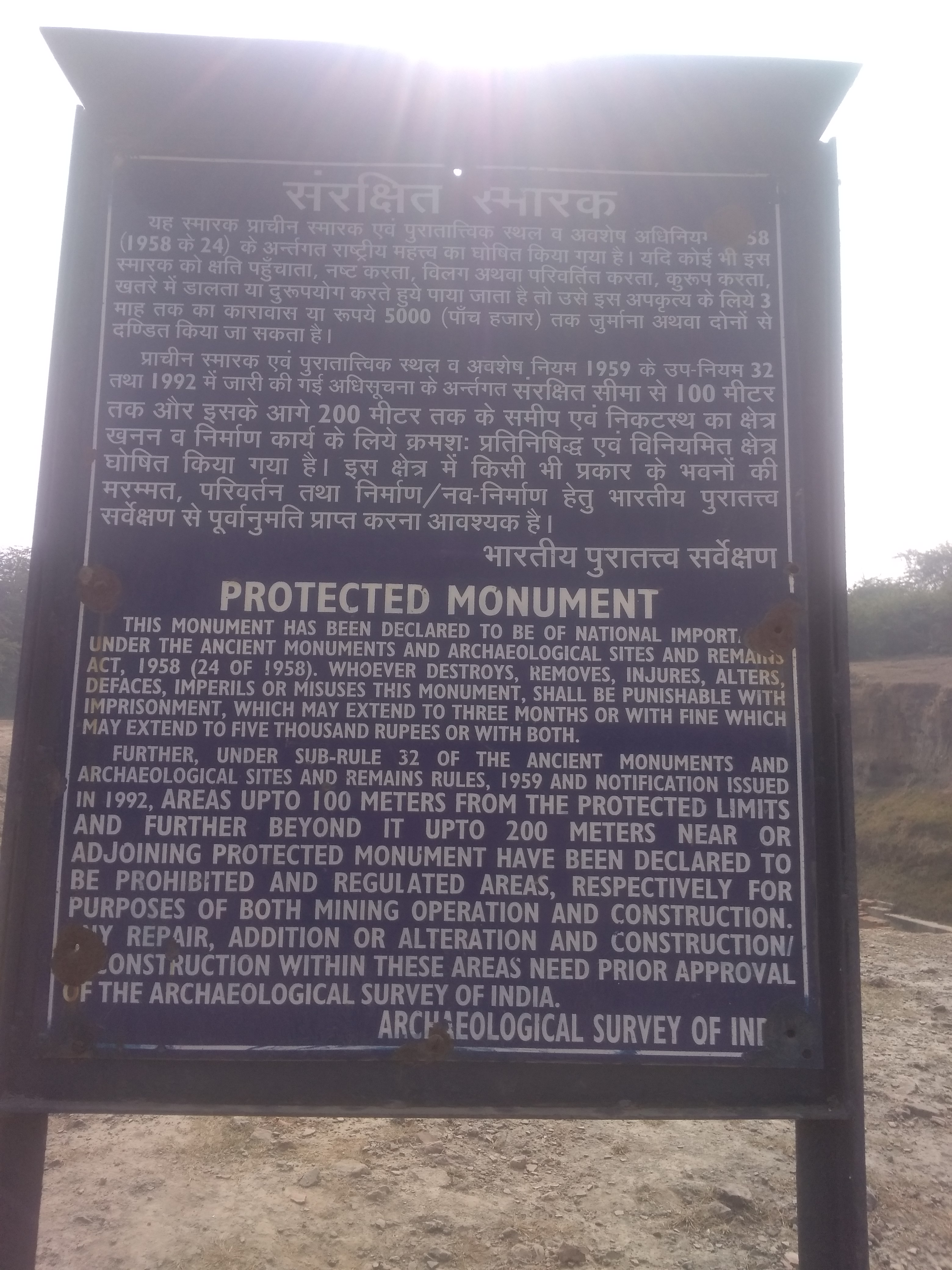 Information Shringwerpur